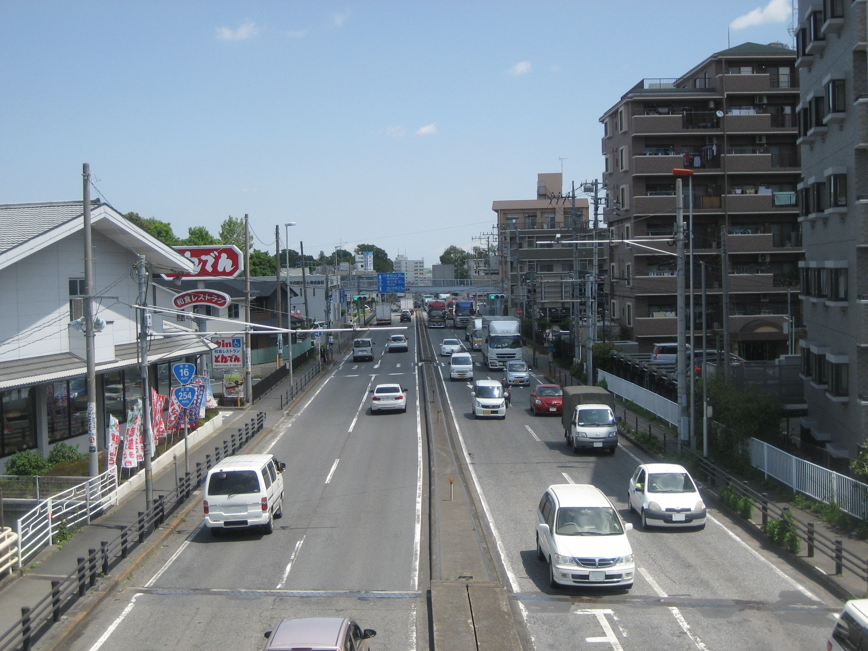 国道16号線川越バイパス埼玉県川越市新宿北交差点付近（国道254号線との重複区間）